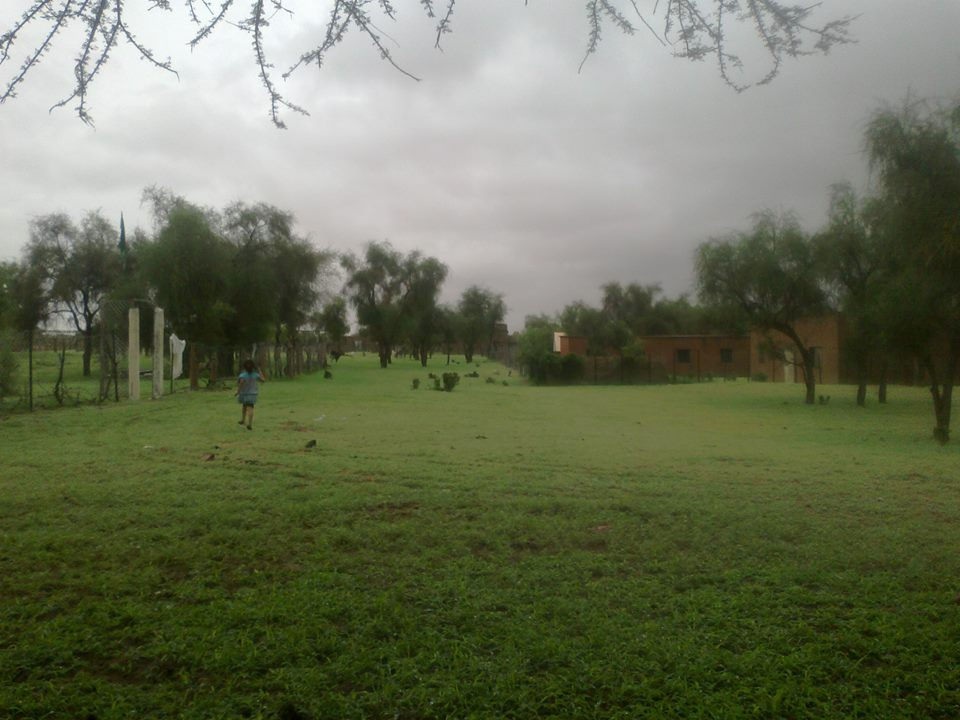 مراعي